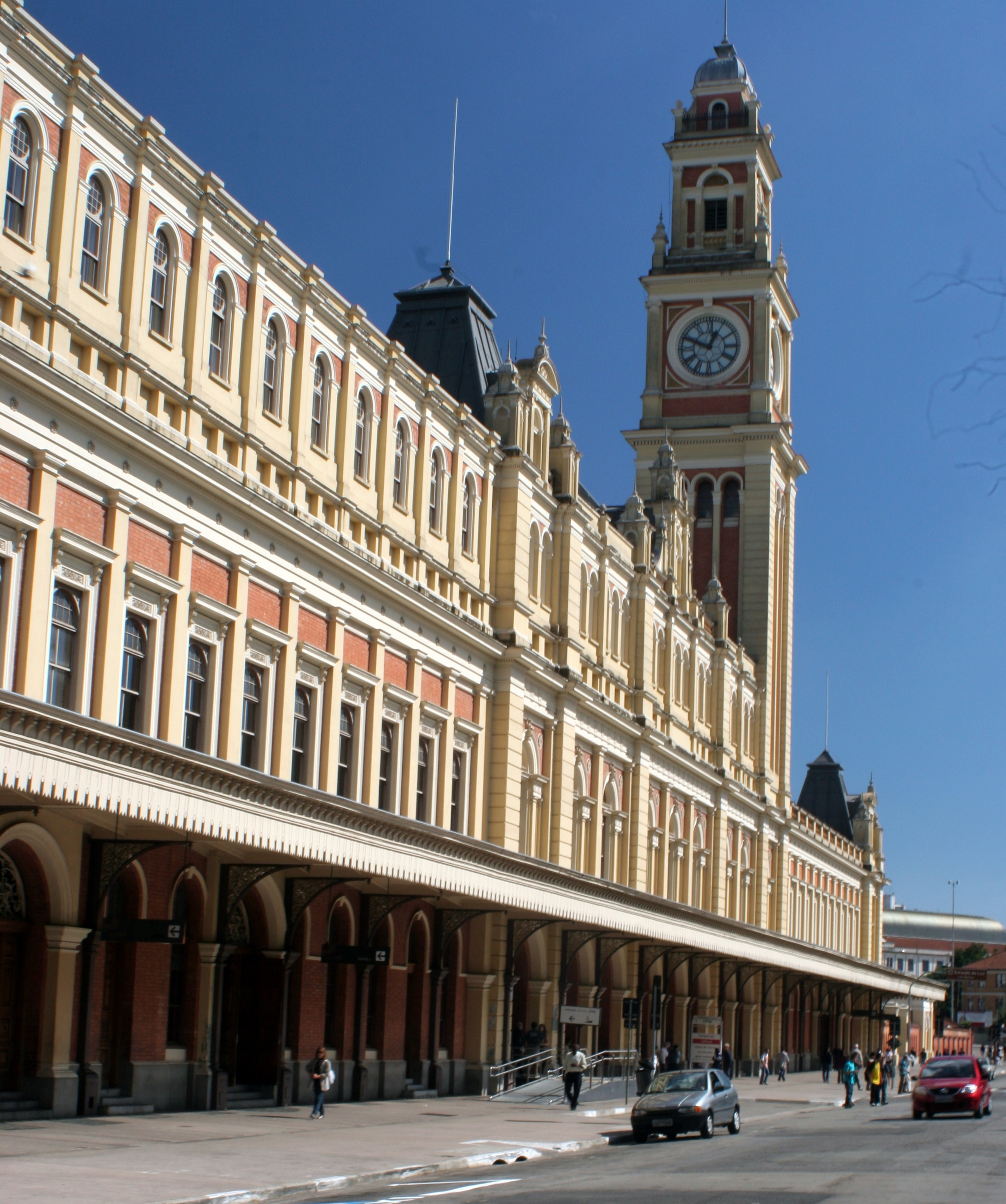 Estação da Luz, em São Paulo, Brasil.